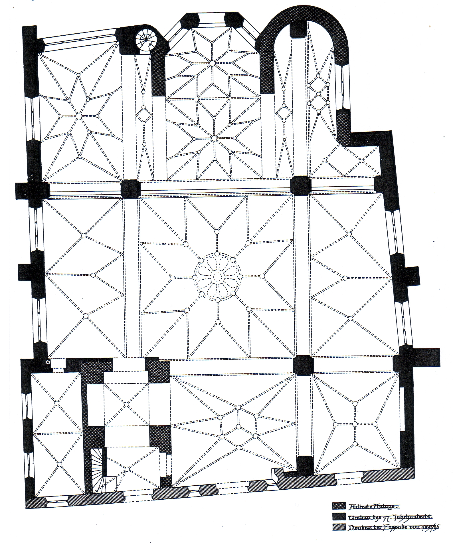 Alt St. Alban Köln